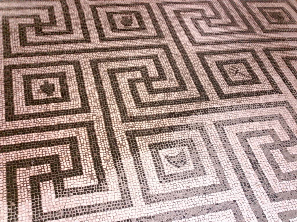 Mosaikfußboden aus einem Bad in Herculaneum, selbst fotografiert, 2005